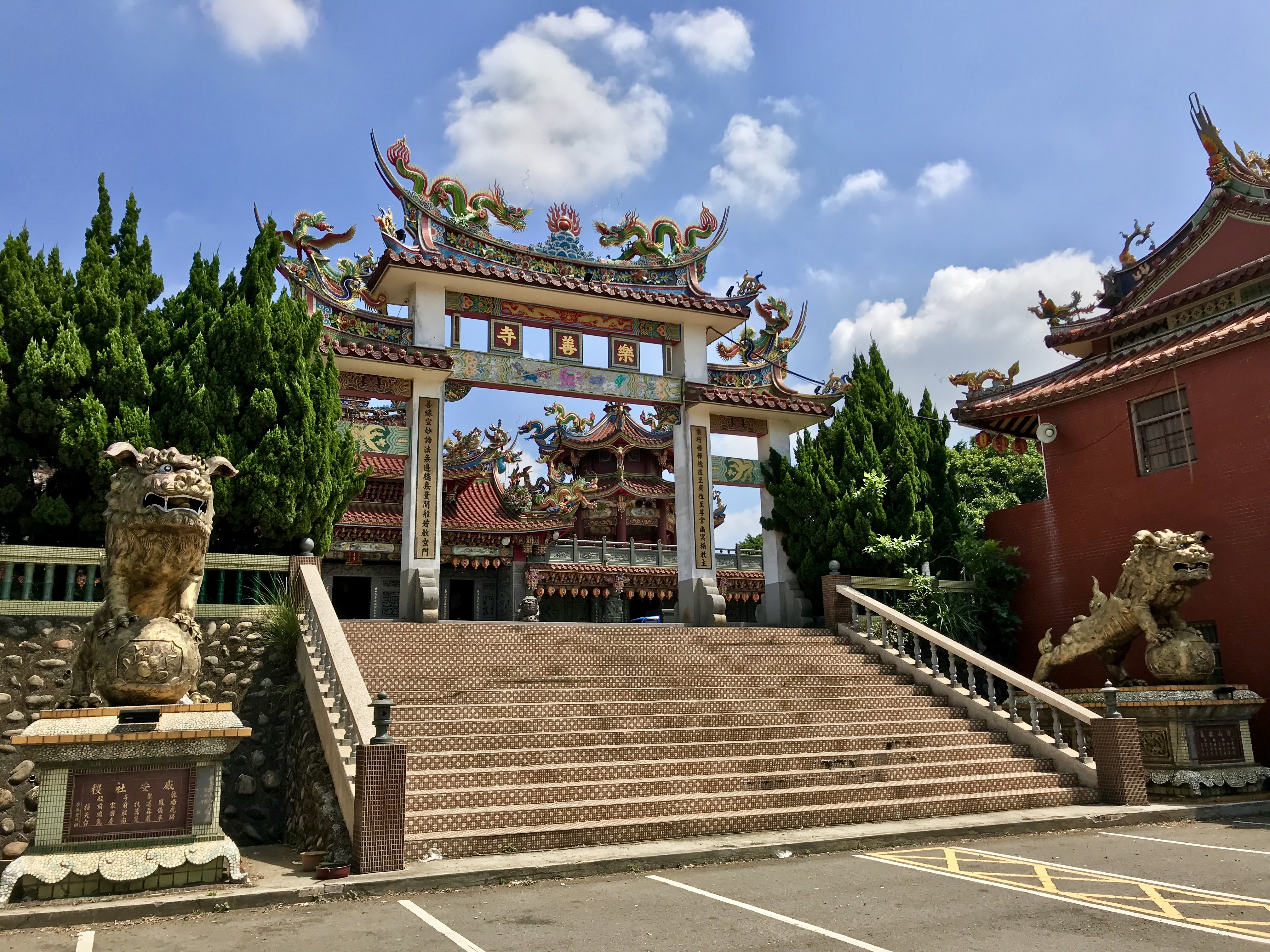 中文（台灣）: 樂善寺牌樓